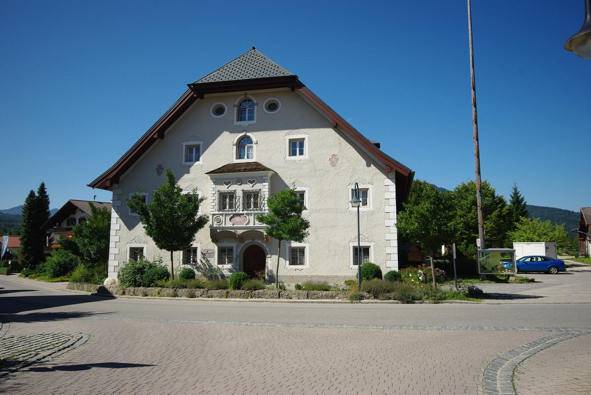 Schmelzer Str. 2, 83334 InzellThis is a photograph of an architectural monument.